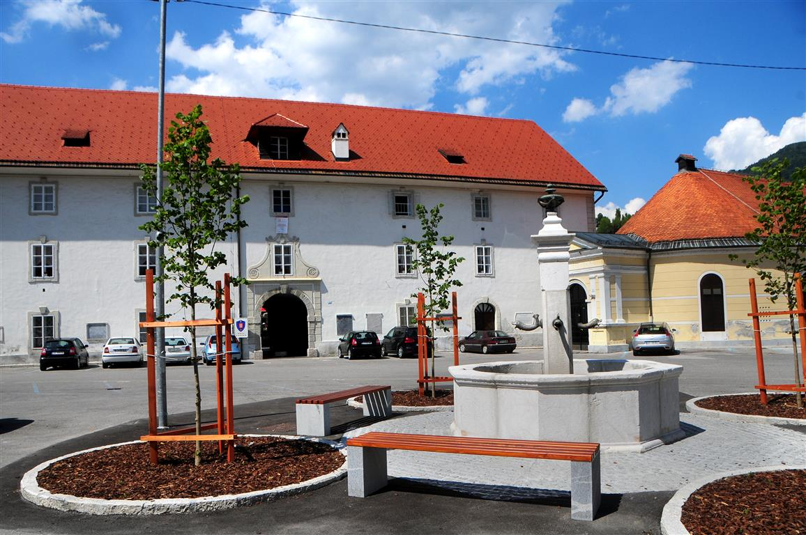 Magacin in Filmsko gledališče